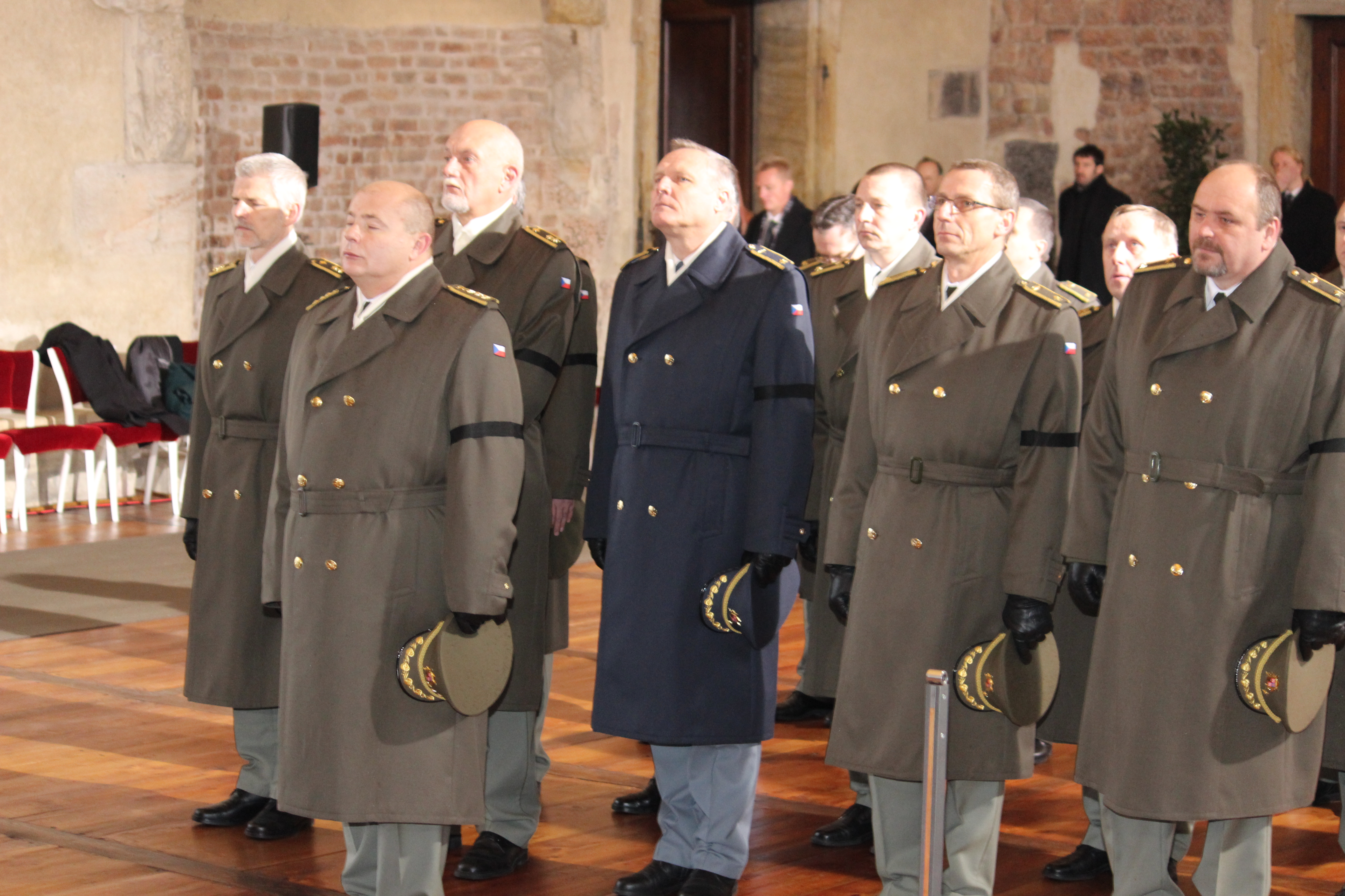 Ve středu 21. 12. 2011 byla rakev s ostatky Václava Havla přemístěna z Pražské křižovatky do Vladislavského sálu Pražského hradu. This photograph was taken with a DSLR from WMCZ's Camera grant.